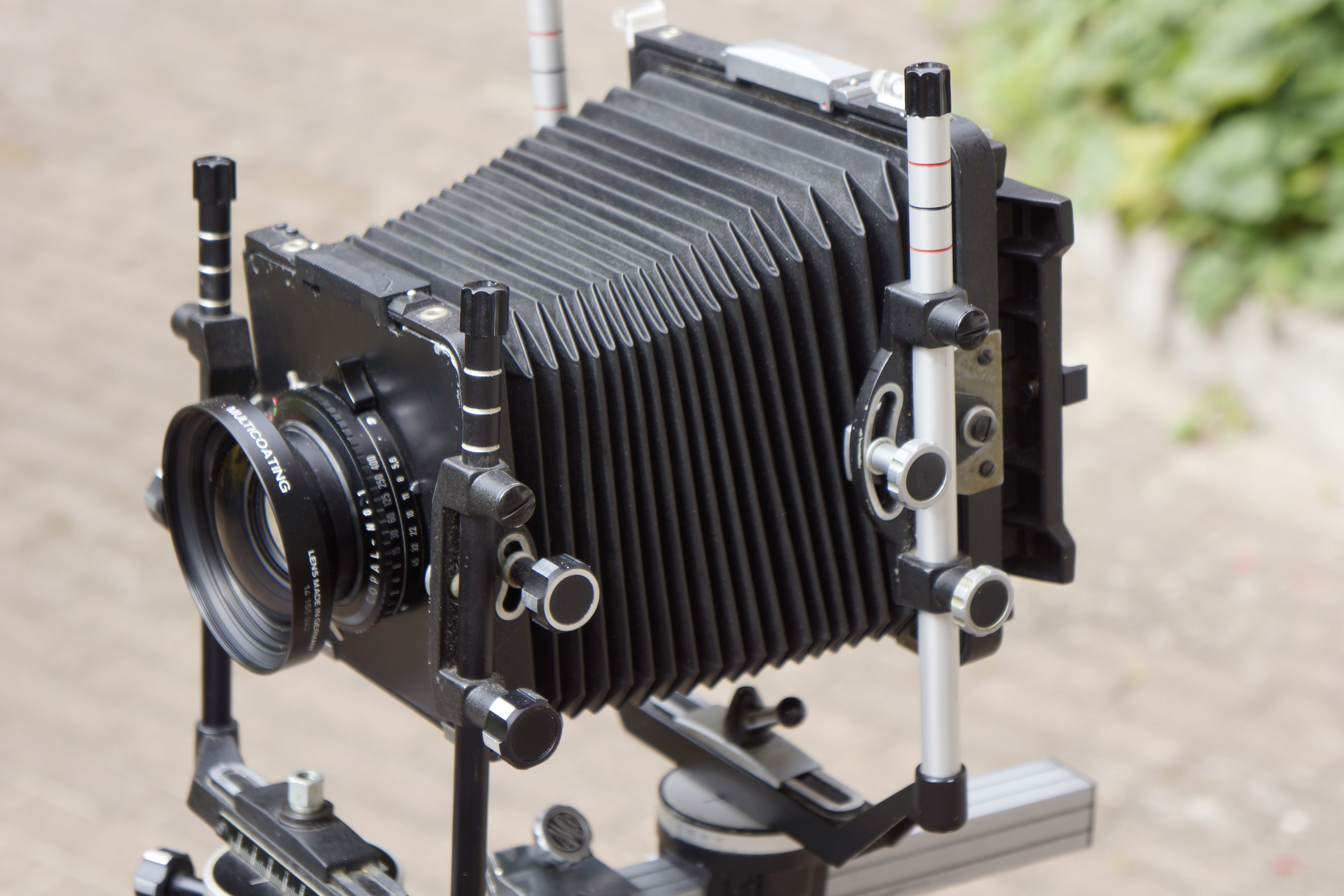 _DSC2161